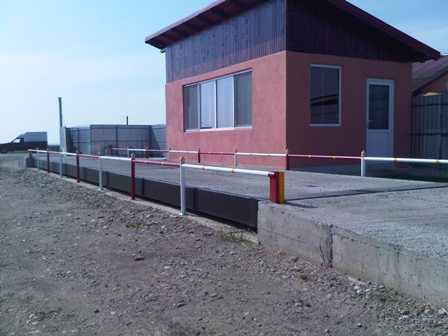 Cantar Auto cu structura din beton